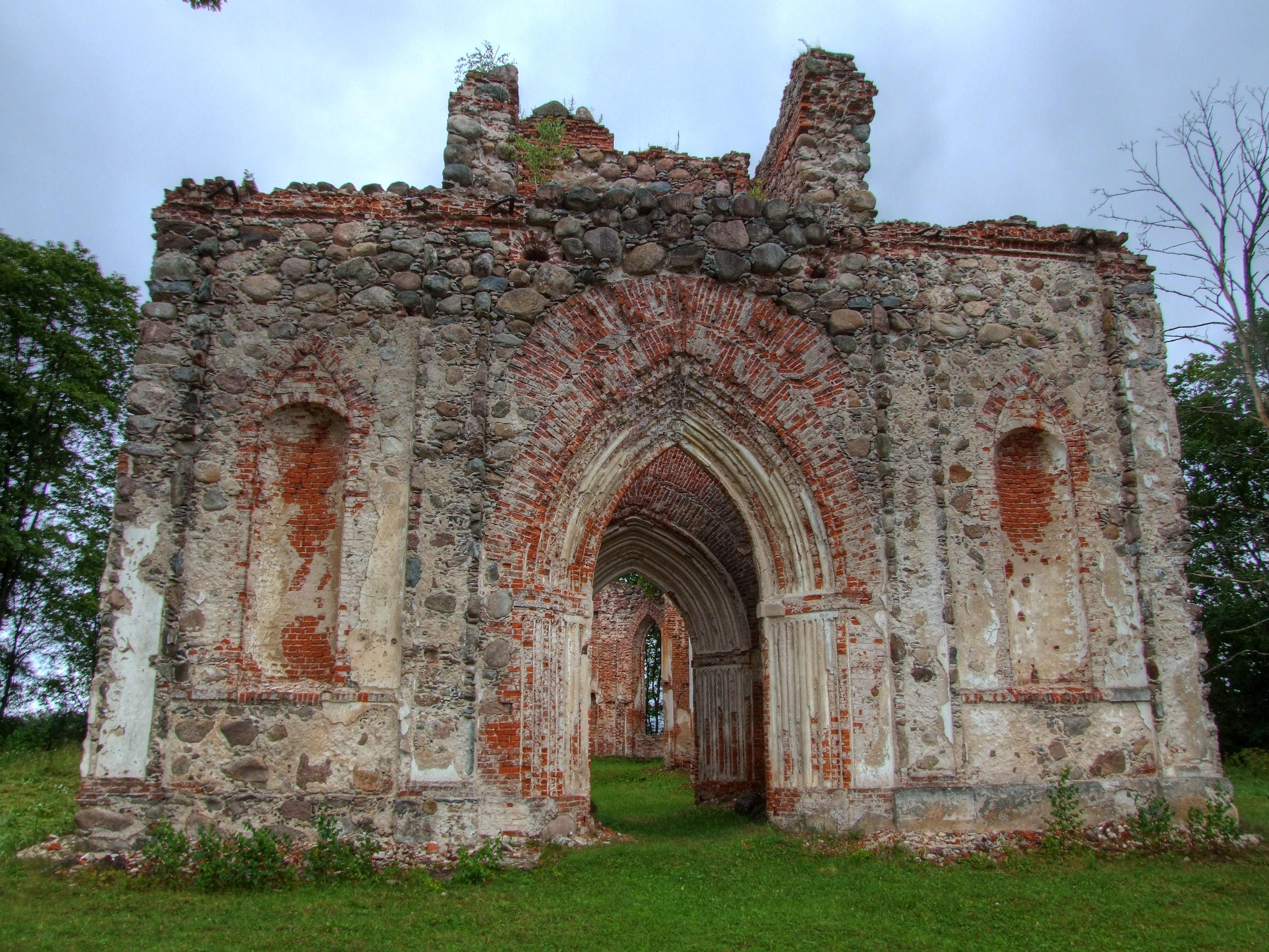 Veckalsnavas baznīcas drupas